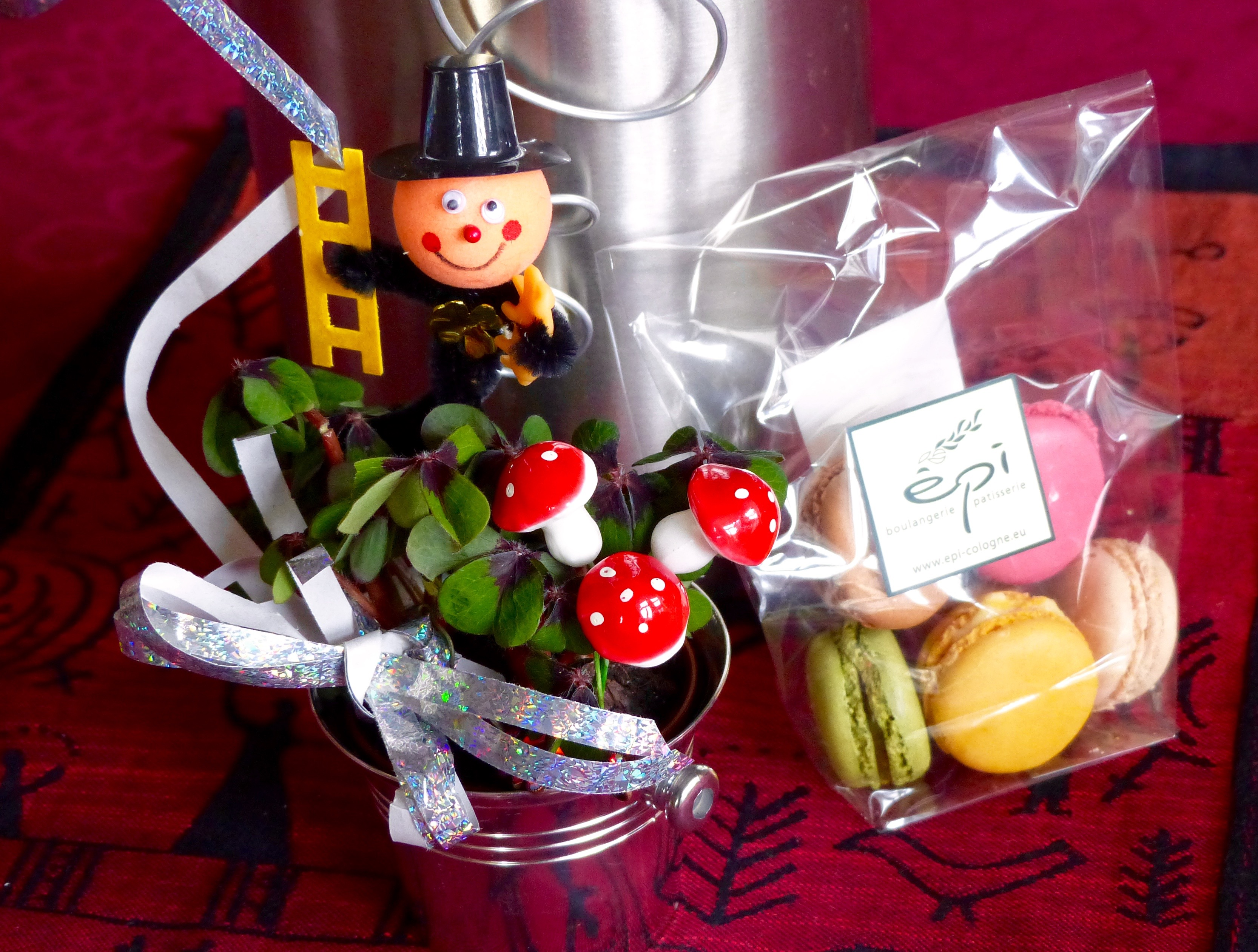 Traditioneller Glücksbringer mit Macarons